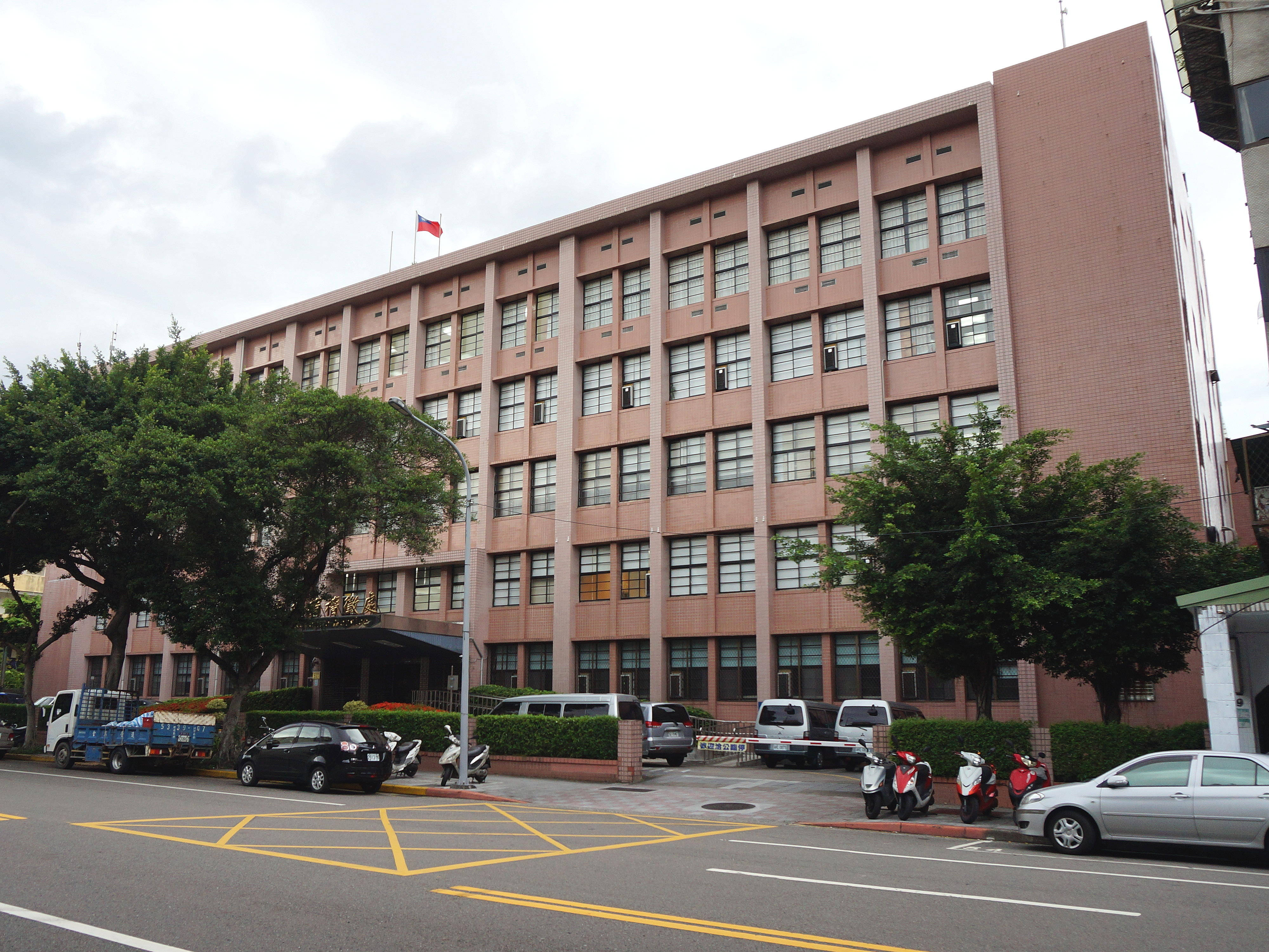 臺北市稅捐稽徵處，地址：臺北市中正區北平東路7之2號。